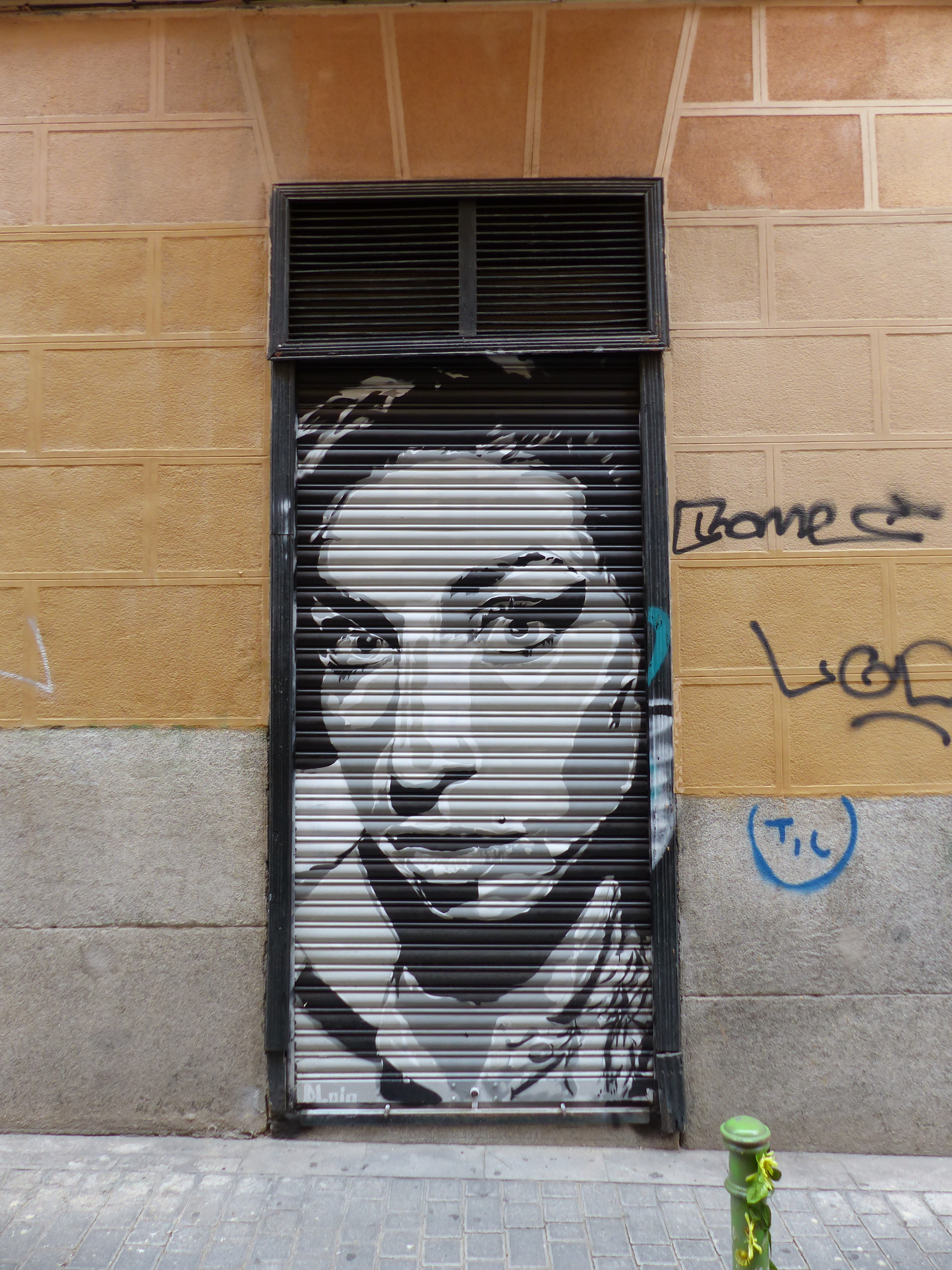 Grafiti de Amy Winehouse, Madrid, España